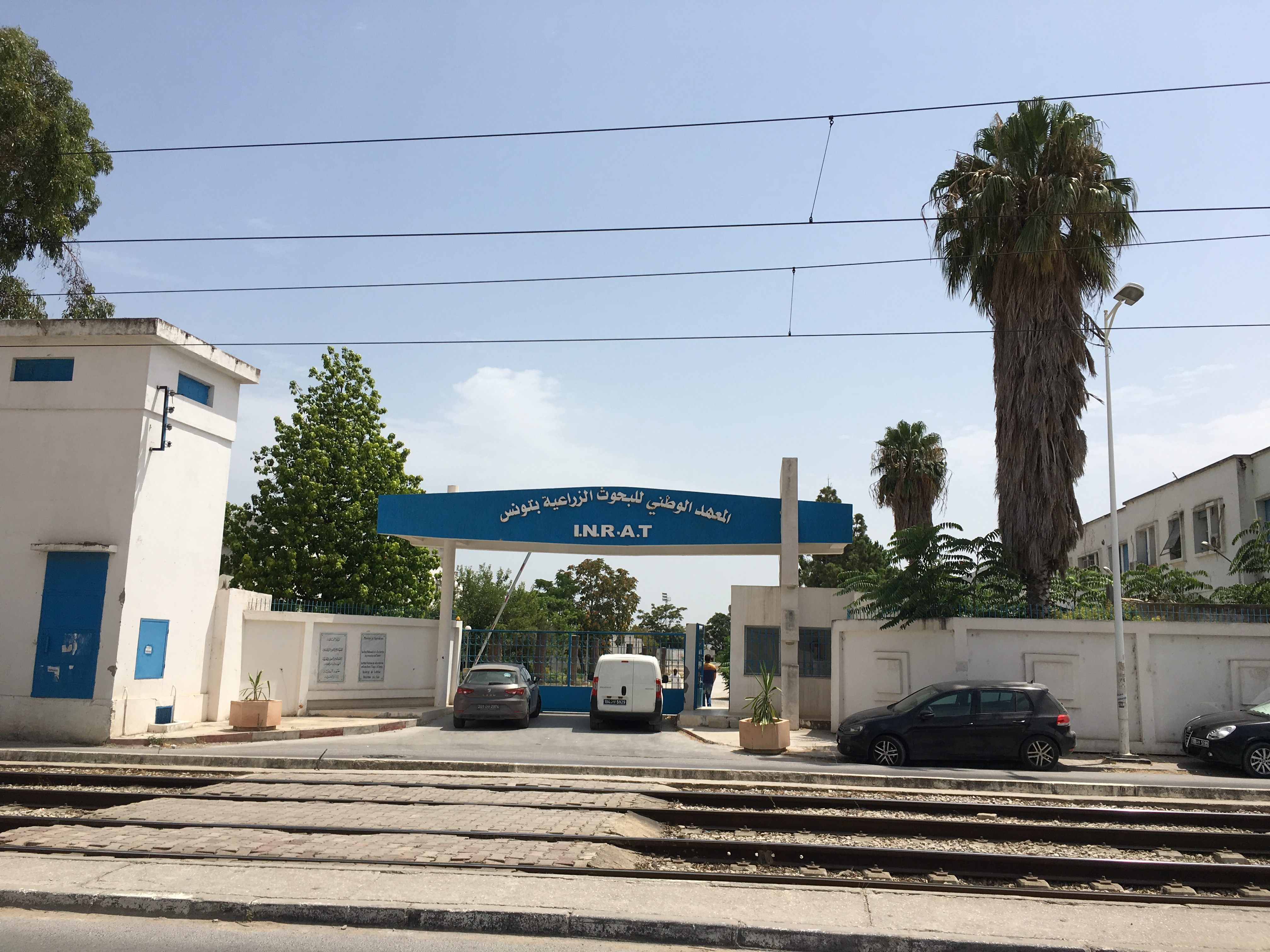 Entrée de l'Institut National de la Recherche Agronomique de Tunisie (INRAT) au Centre Urbain Nord (Tunis), 2019.